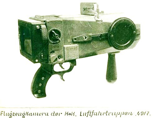 Снимка на самолетна камера на австро-унгарските императорски въздушни войски.